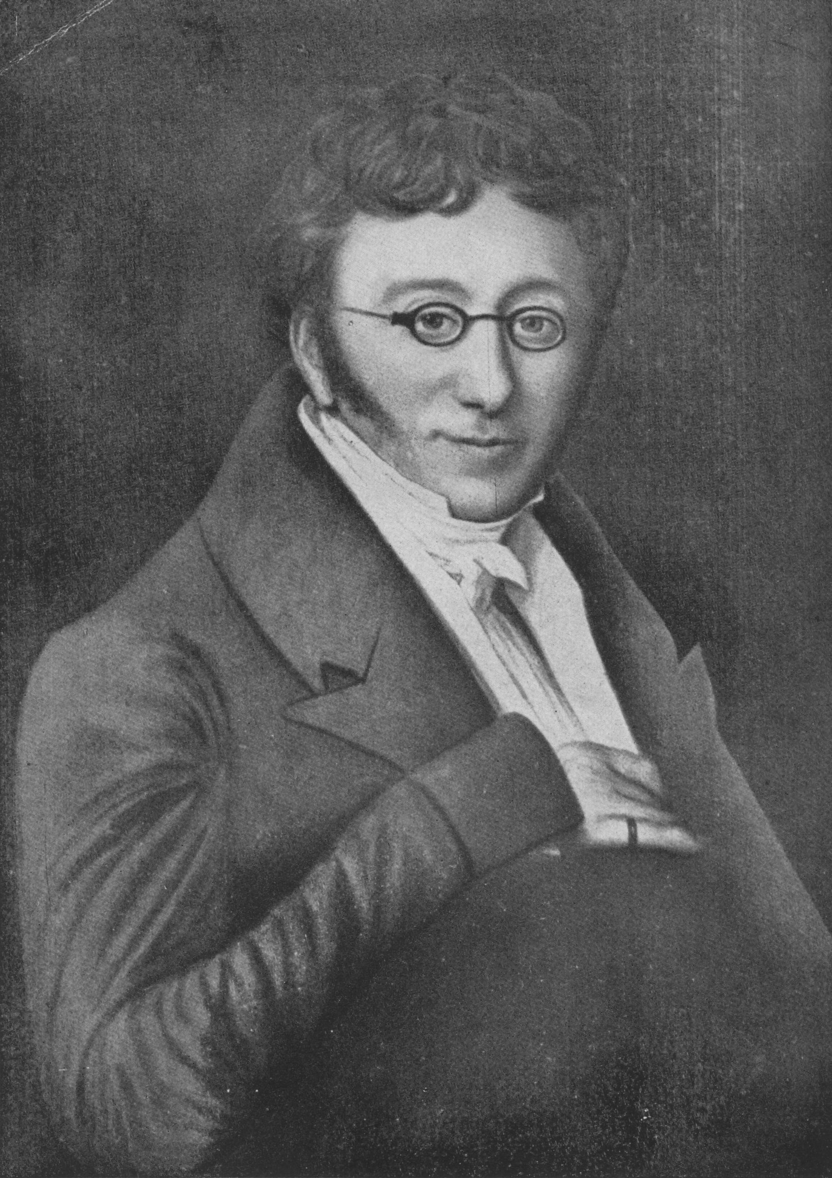 Fotografie eines Gemäldes, Porträt von Jean Jaques Cuny II.